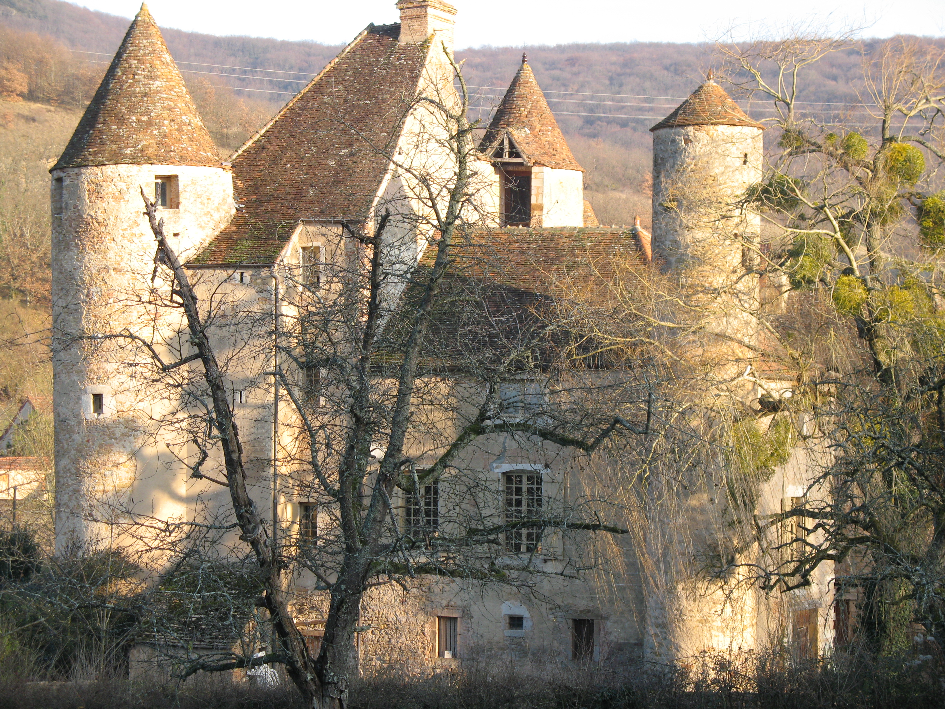 château de Balleure